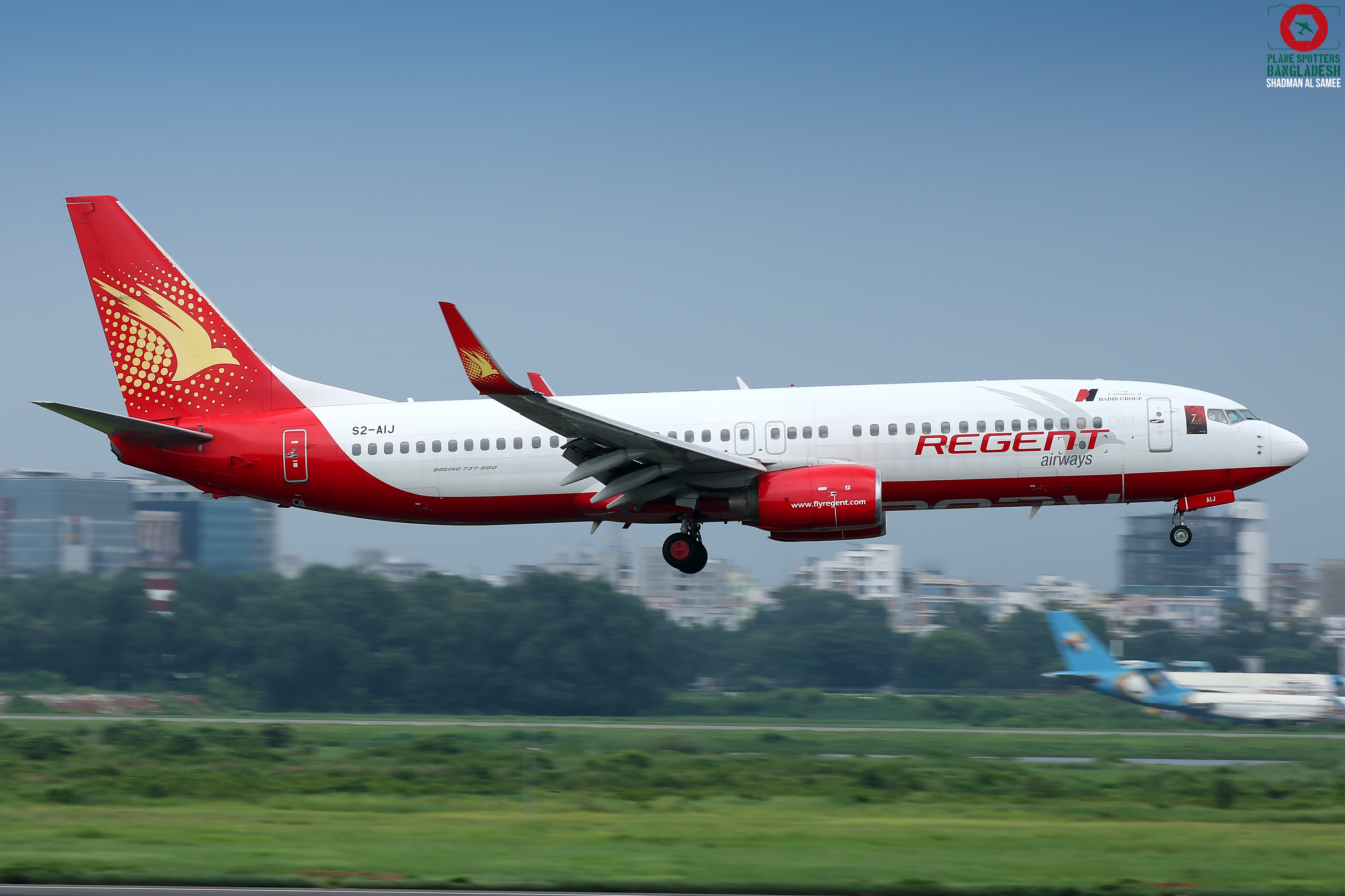 VGHS 2018.